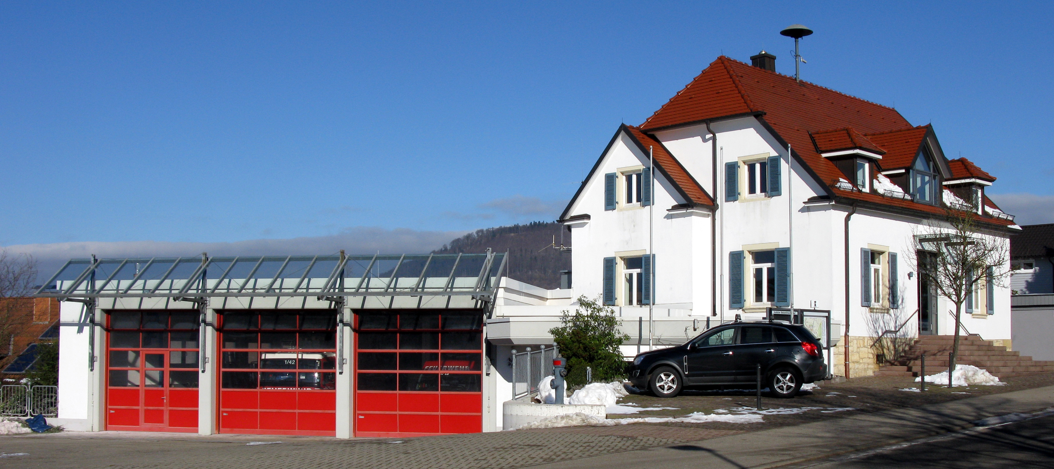 Rathaus von Sölden im Schwarzwald mit Feuerwache